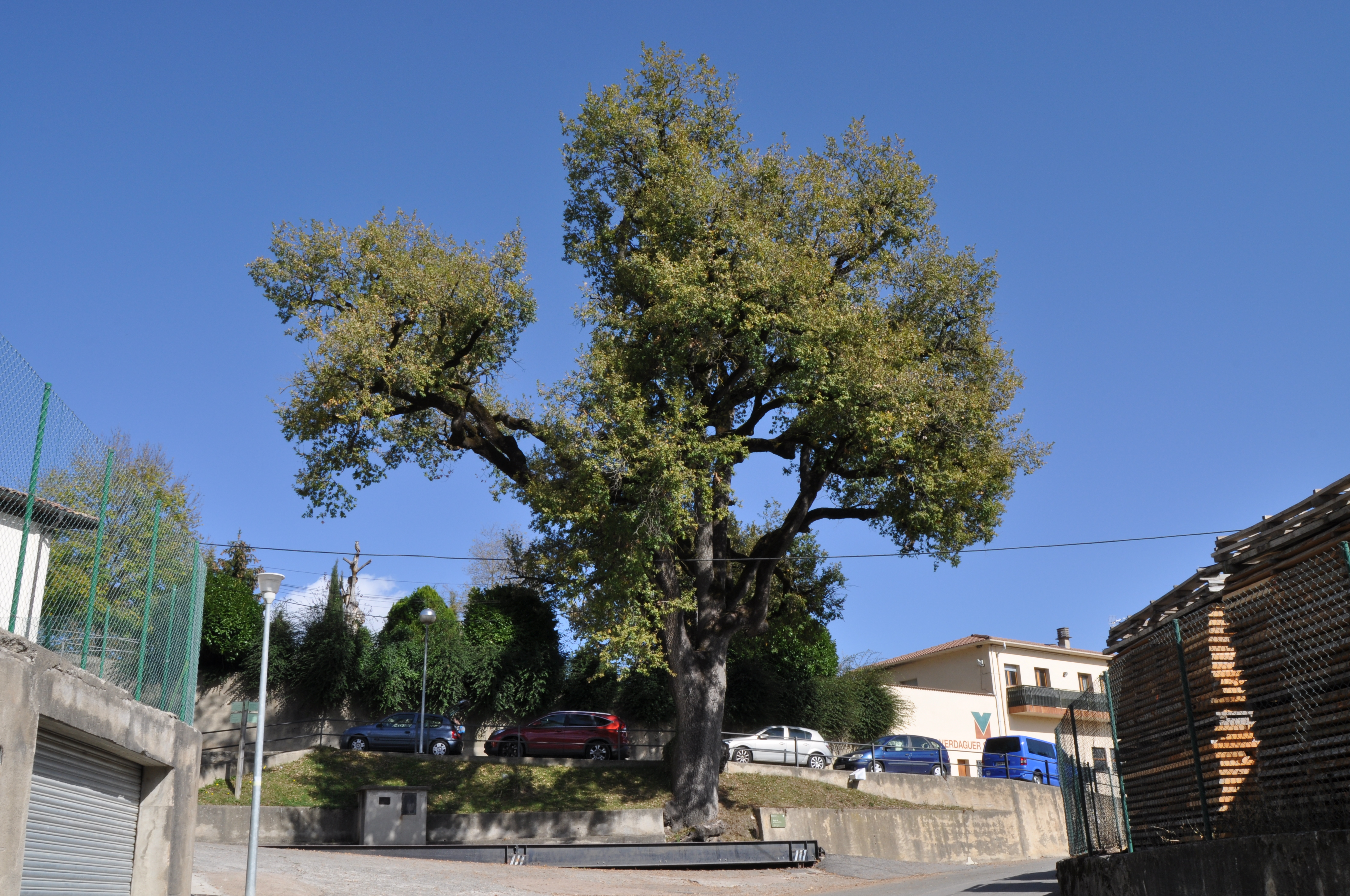 Roure de la Creu de l'Arç a Vidrà (Osona, província de Girona, Catalunya). This is a a photo of a protected or outstanding tree in Catalonia, Spain, with id: MA-24.212.03